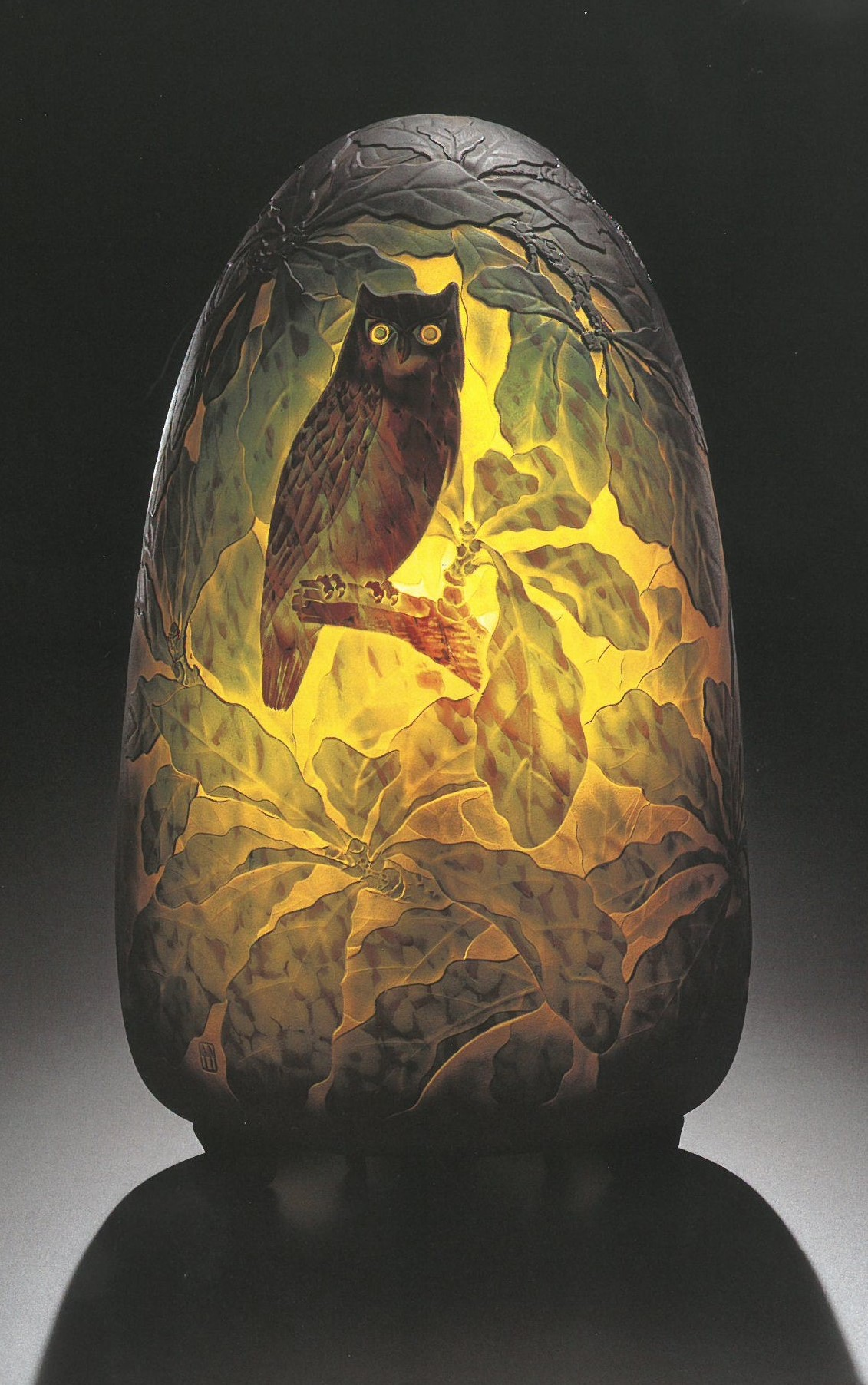 六層の被せガラスに３００回余のサンドブラストを施した作品。